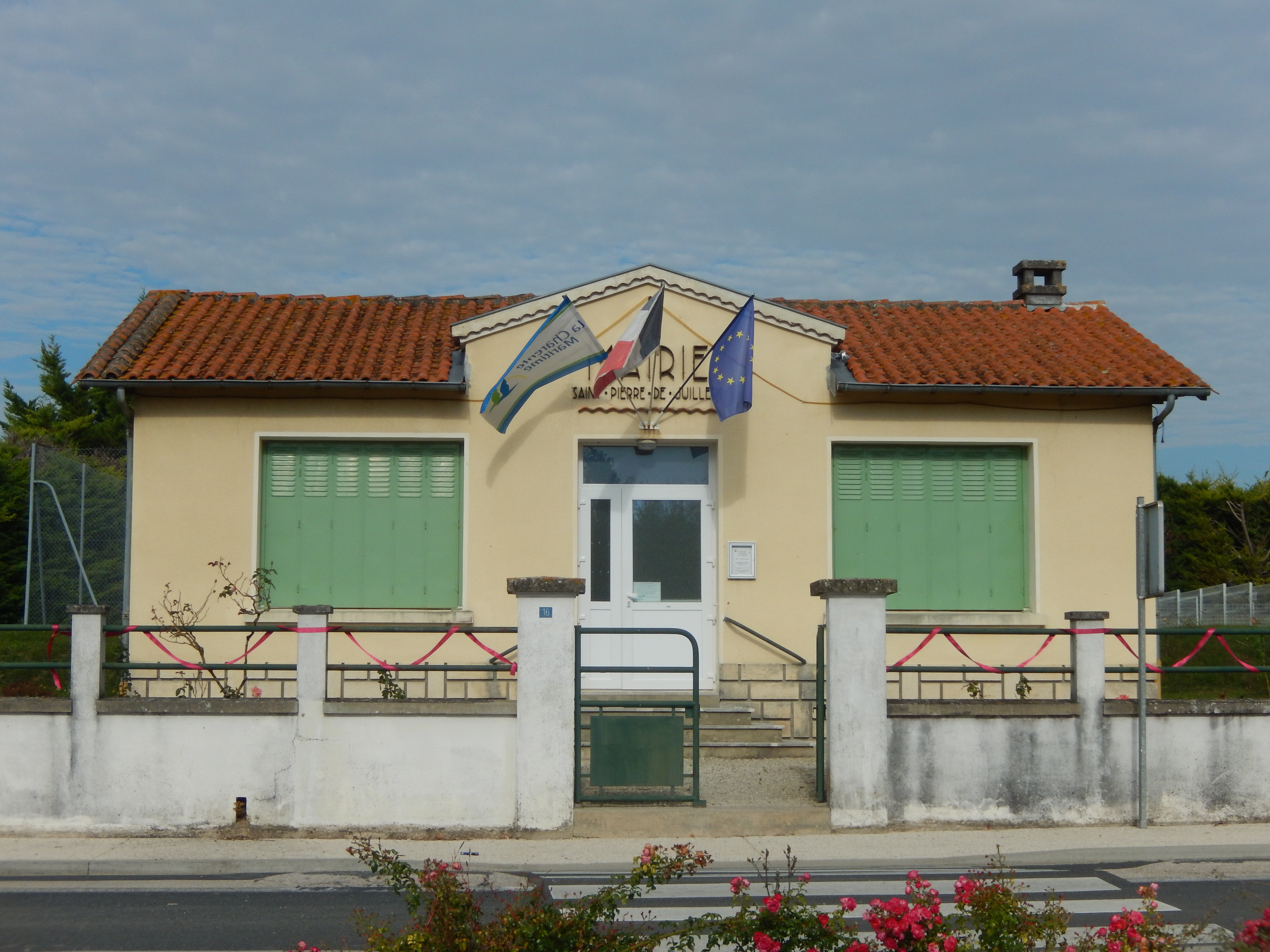 Saint-Pierre-de-Juillers, Charente-Maritime, France. • La mairie de Saint-Pierre-de-Juillers, située dans le village de Courgeon. Les rubans roses acrochés aux grilles sont un signe de soutien à Octobre Rose, une campagne de sensibilisation au dépistage du cancer du sein.